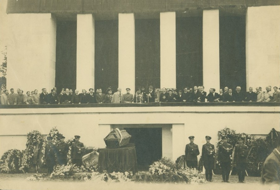 Поклонението пред ковчега на Георги Димитров.